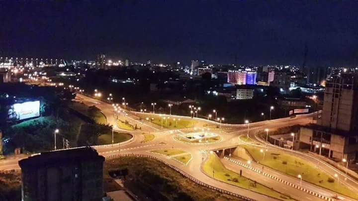 DOUALA